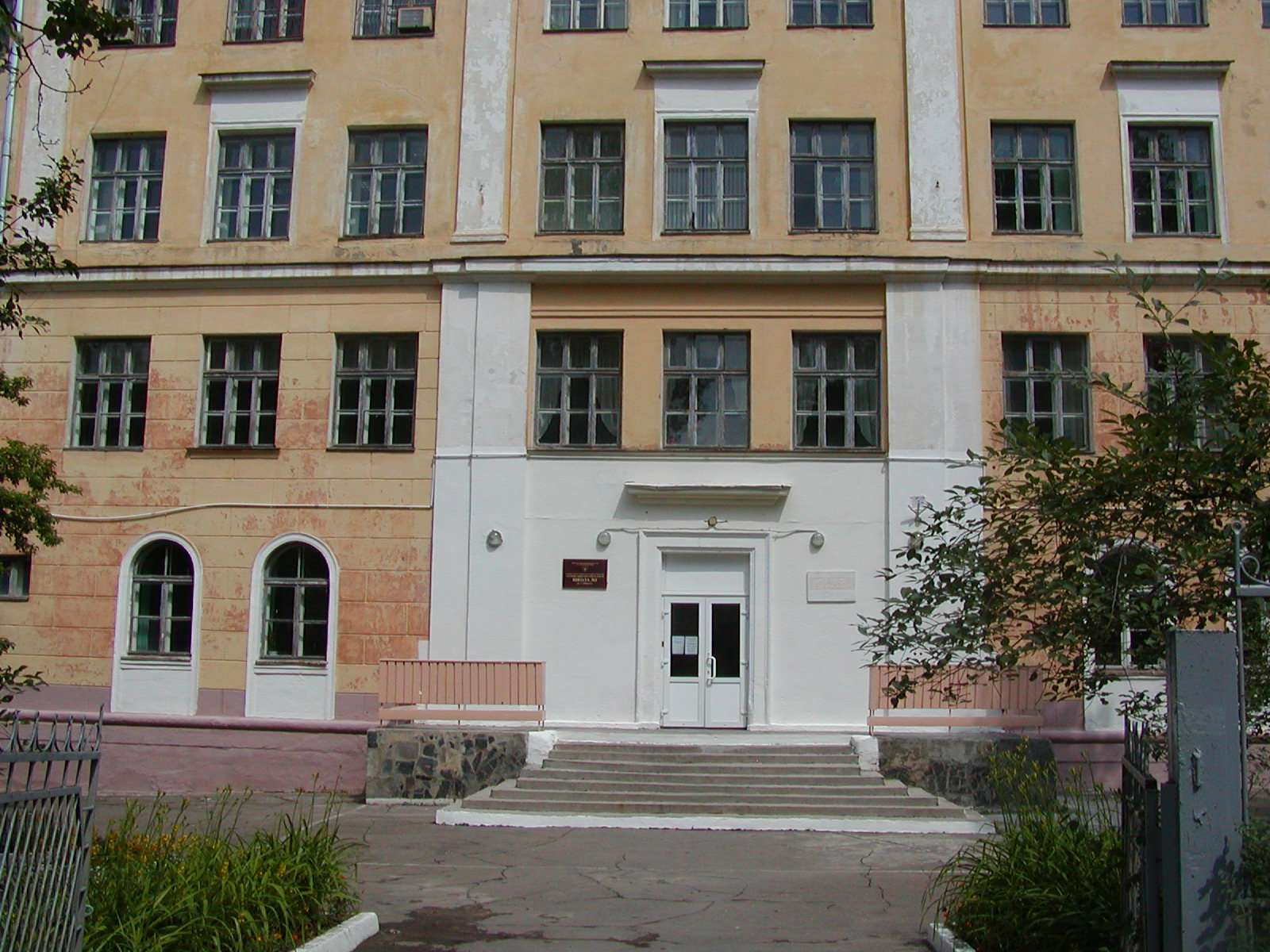 Парадный вход школы № 1 (Обнинск).